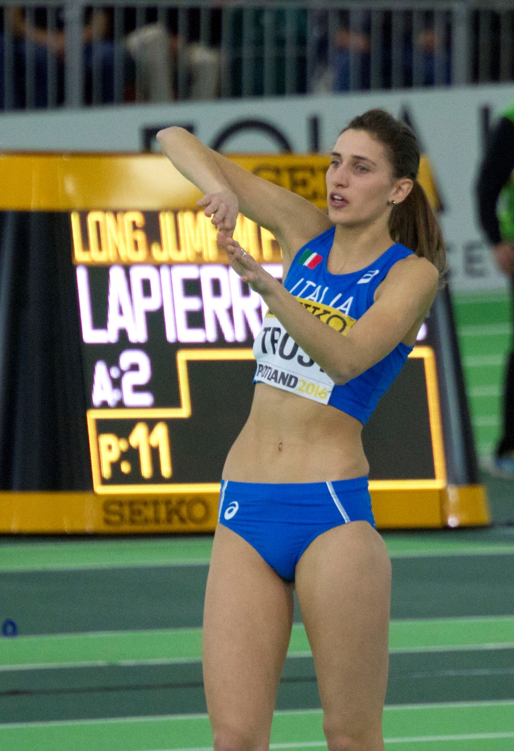 5082 trost